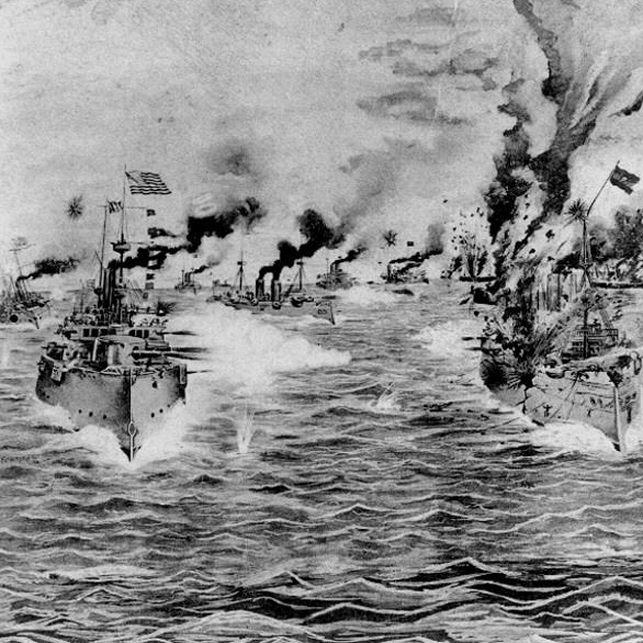 Рисунок боя американского и испанского крейсеров источник: автор: неизвестен датировка: 1898